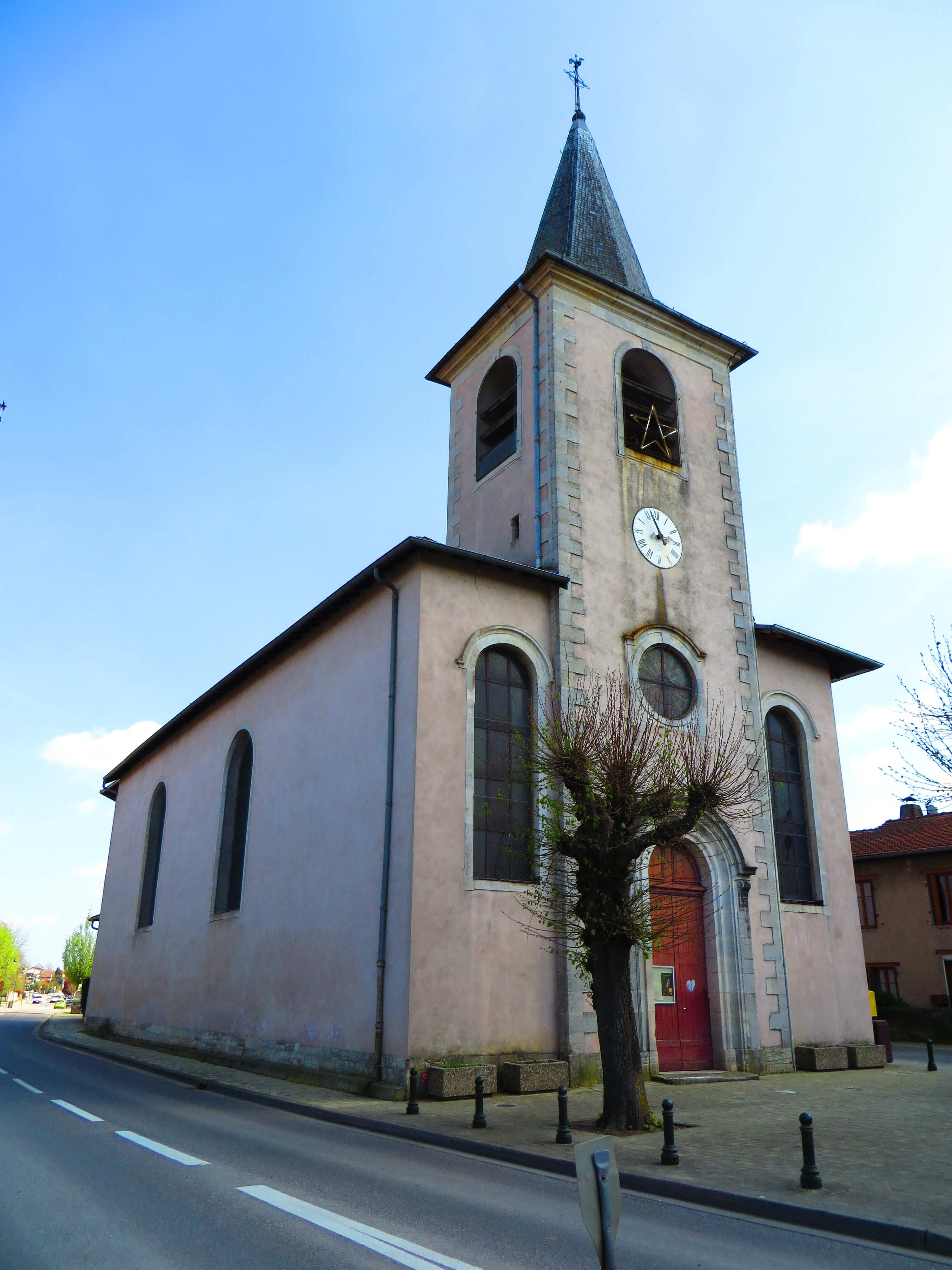 Sommerviller eglise